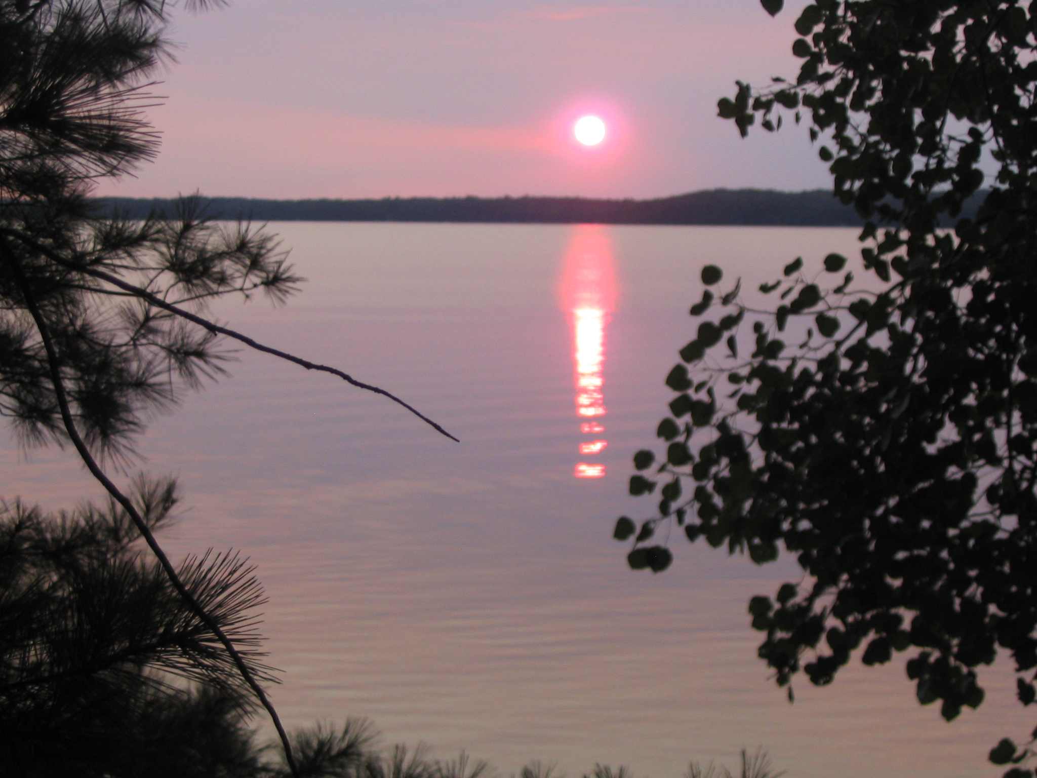 Grindstone Lake, Wisconsin at sunset